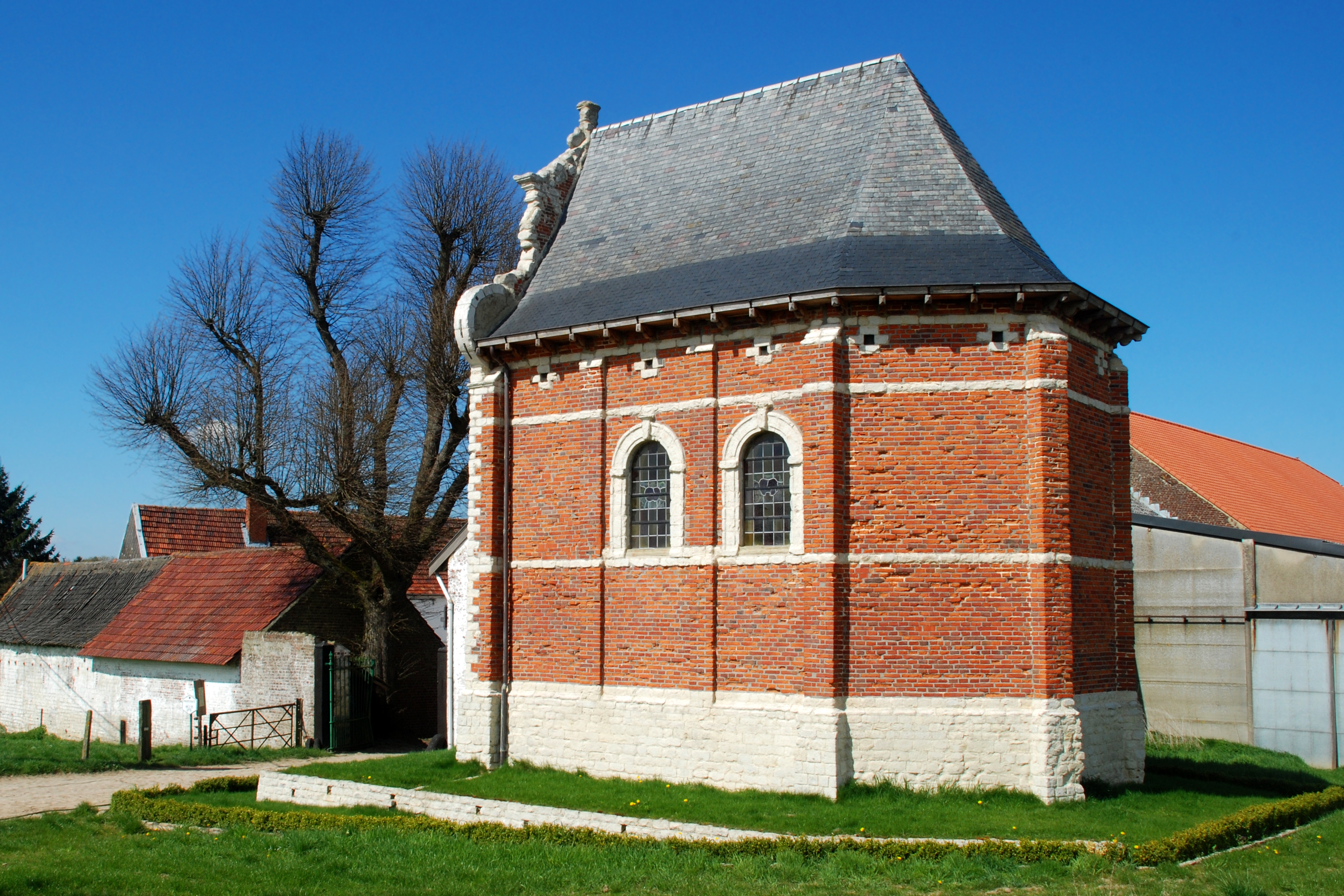 Belgique - Brabant wallon - Genappe - Chapelle du Chantelet